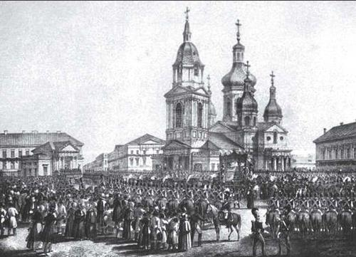 К. Беггров. Вид Печальной процессии императора Александра I на Сенной площади в Санкт-Петербурге. 1826 г.